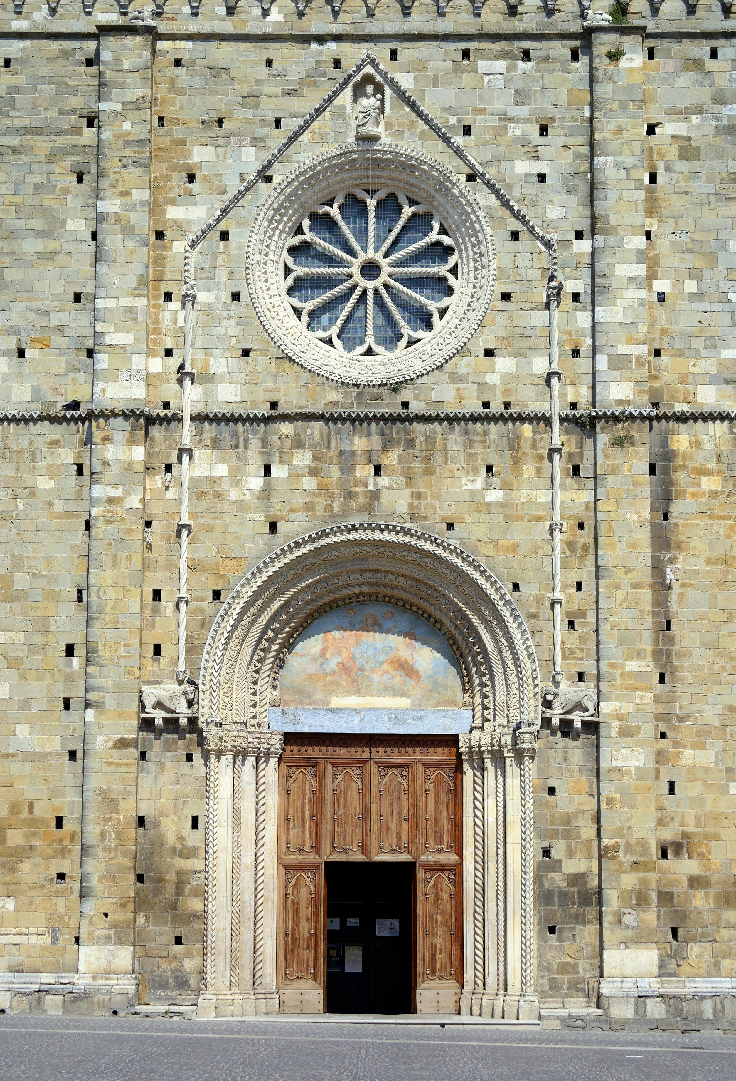 Facciata della Concattedrale di di Santa Maria Assunta ad Atri